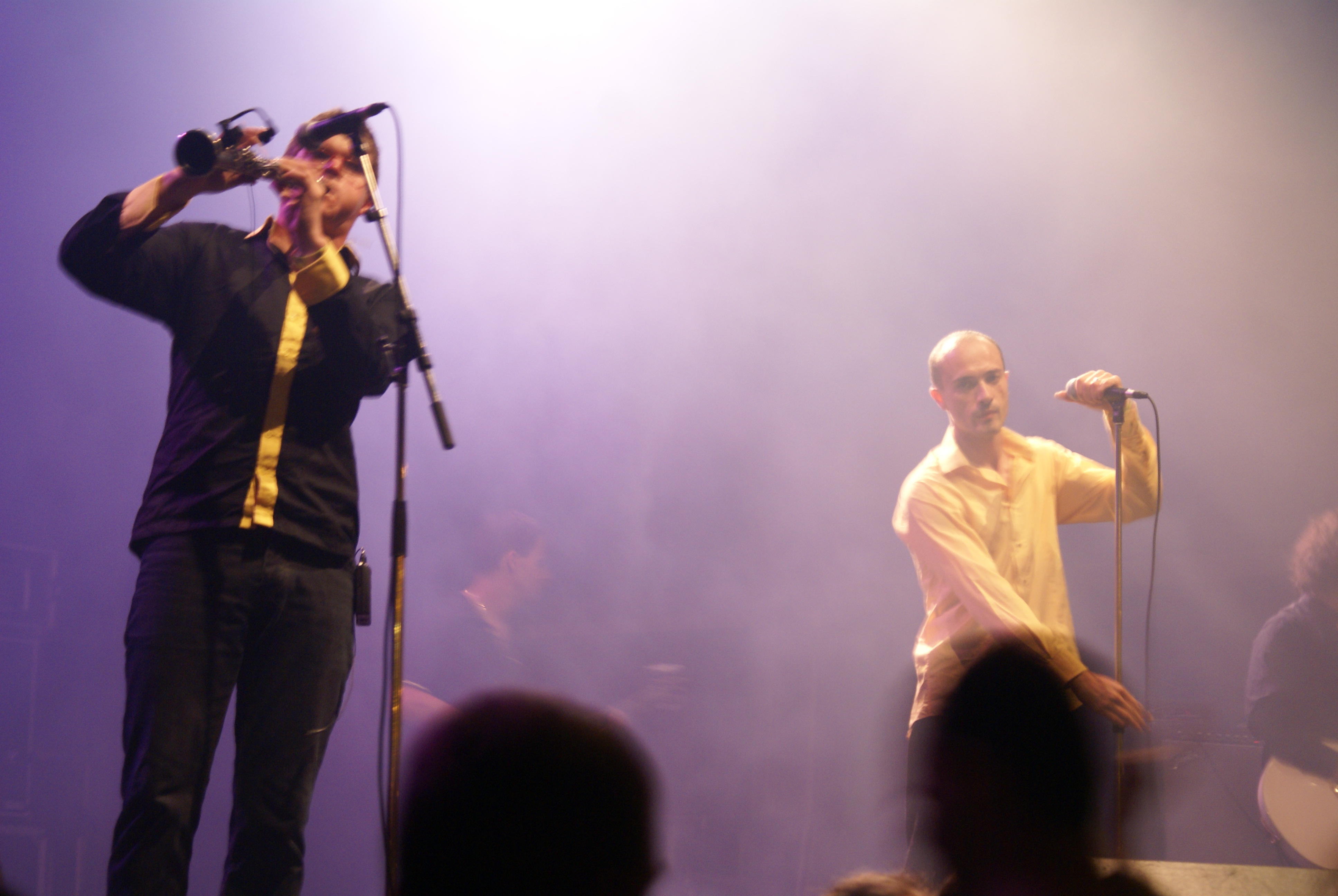 Concert du groupe Merzhin aux Tonnerres de Brest 2012.